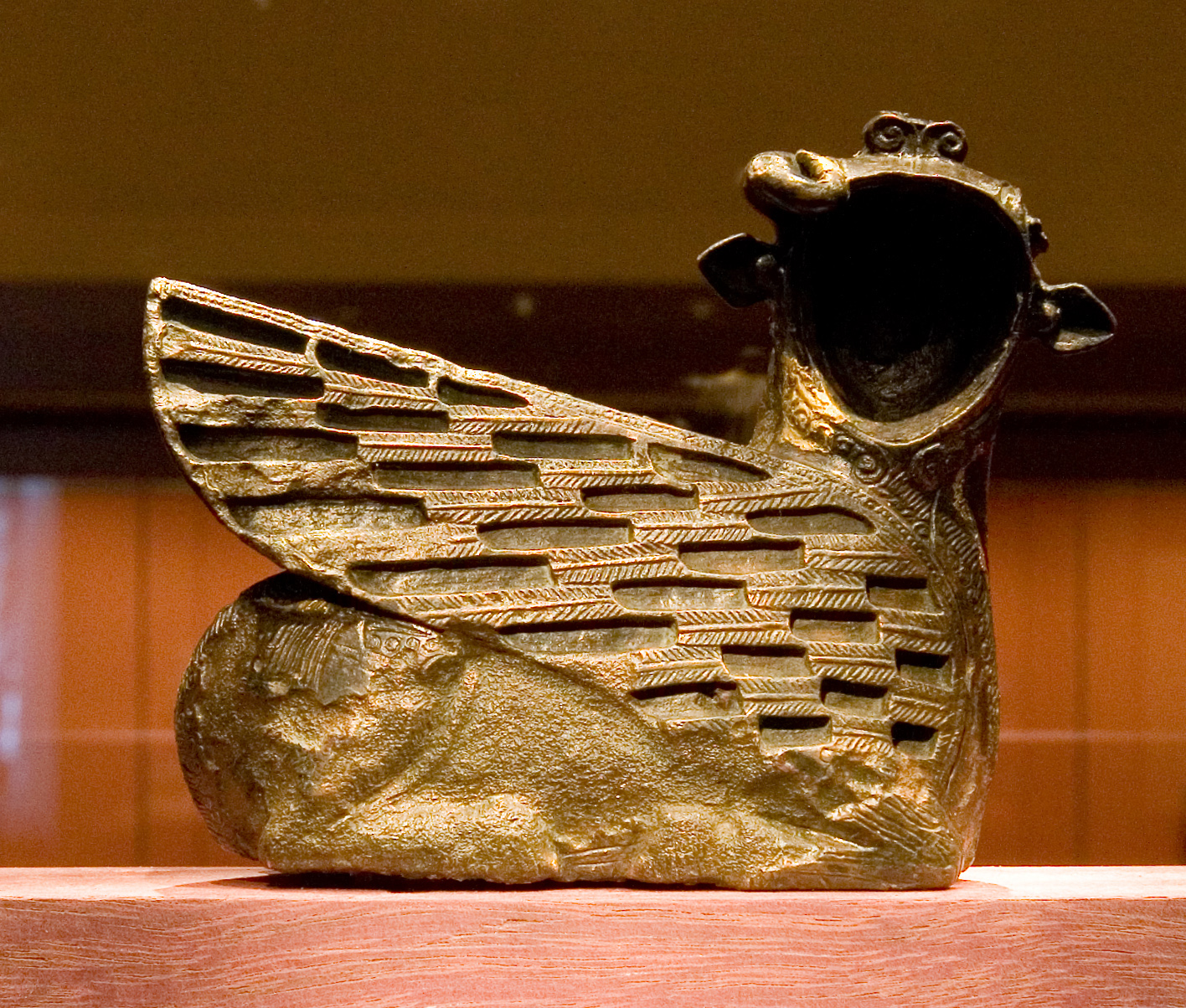 Բրոնզե արձանիկ՝ գահի մաս.